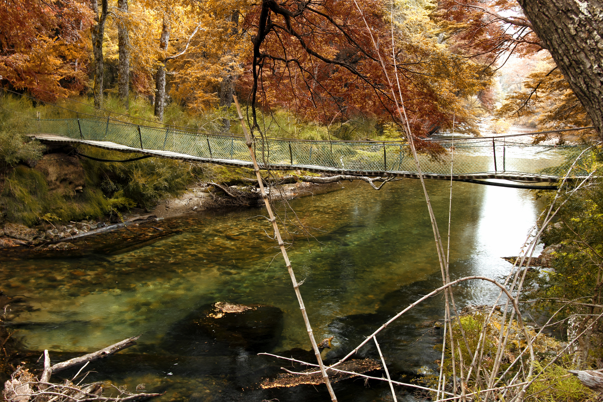 Puente sobre el Río Nonthué.